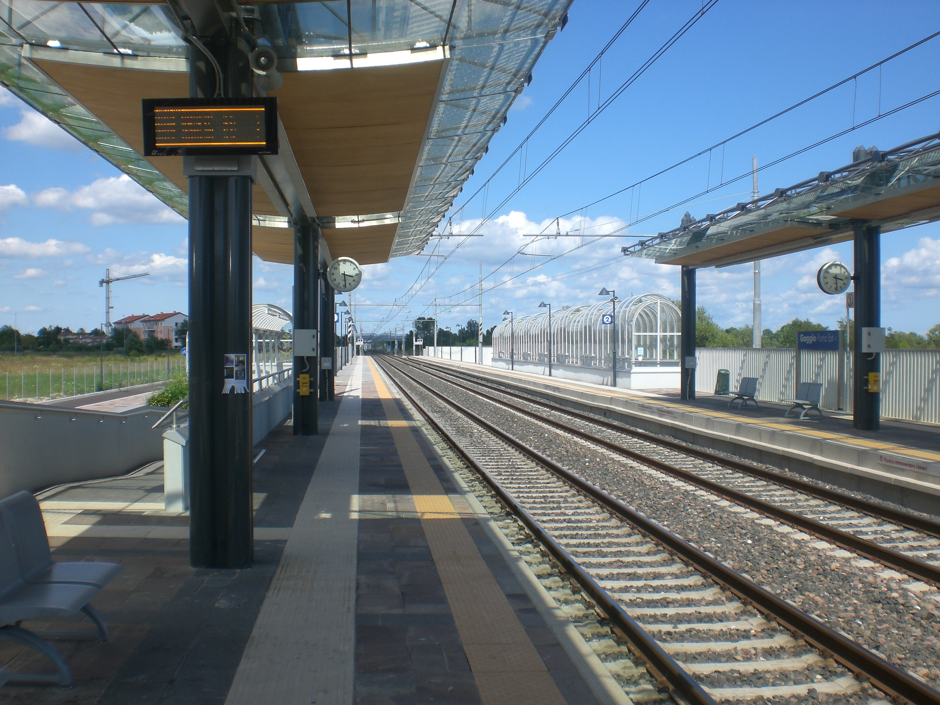 Gaggio P.E.